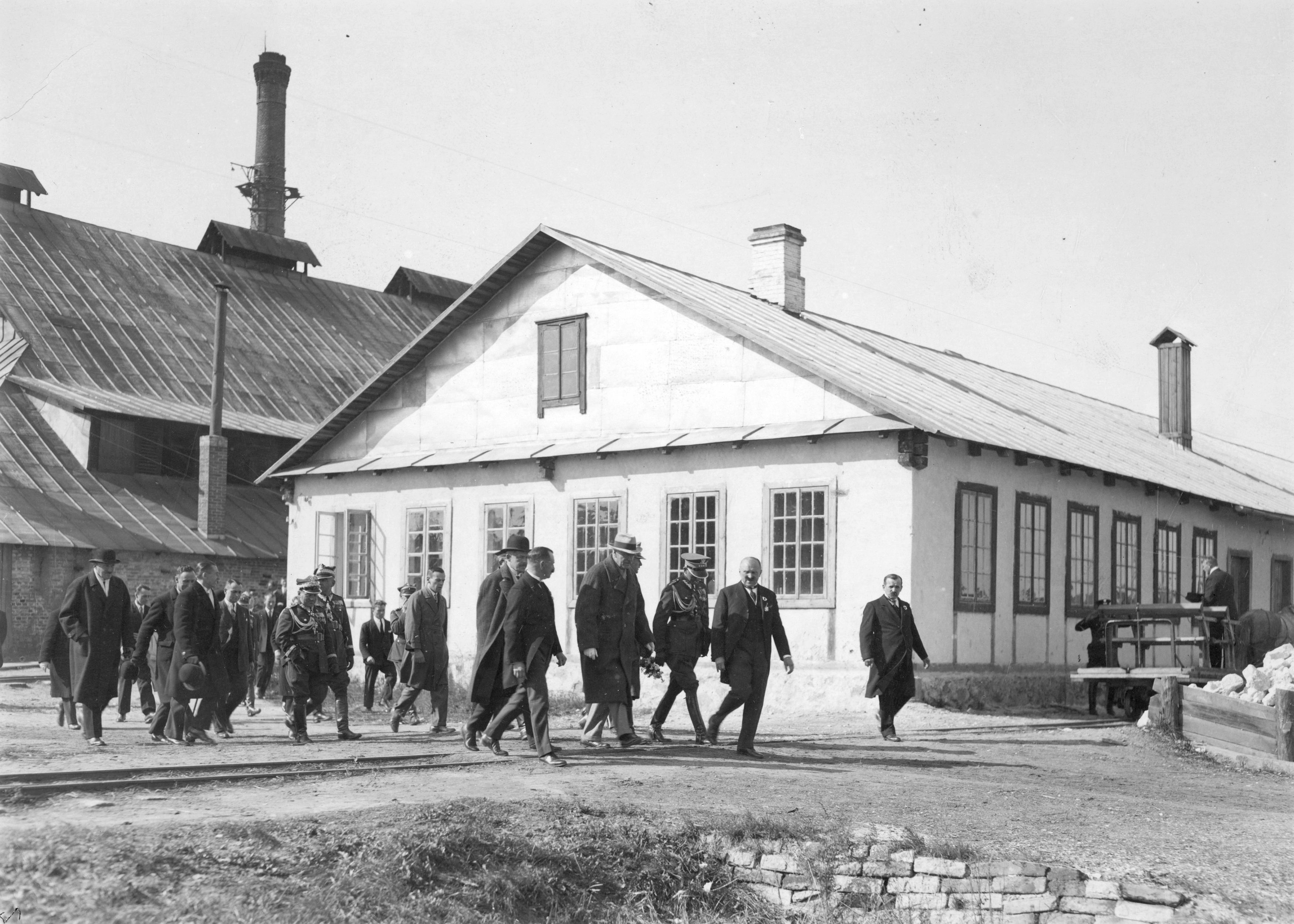 Беларуская (тарашкевіца): Бярозаўка (Biarozaŭka), гута Нёман (Nioman). Візыт прэзыдэнта Польскай Рэспублікі Ігнацыя Масьціцкага